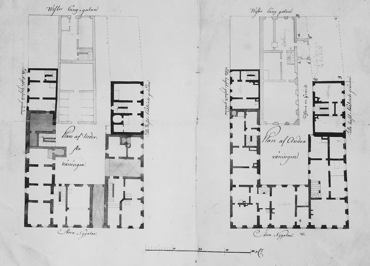 Loheska huset i Kvarteret Ulysses. Förklarande text på ritningen: Gränden B:G är af Loheska huset intagen och nu wid Wester lång gatan nyttjas av samma hus till inkörsel, och över grändens walv wet af Loheska huset bebygt af h.J. samt af huset a b c d e F med ett rum intagen betecknat F.a.B. emot Wester Långgatan.